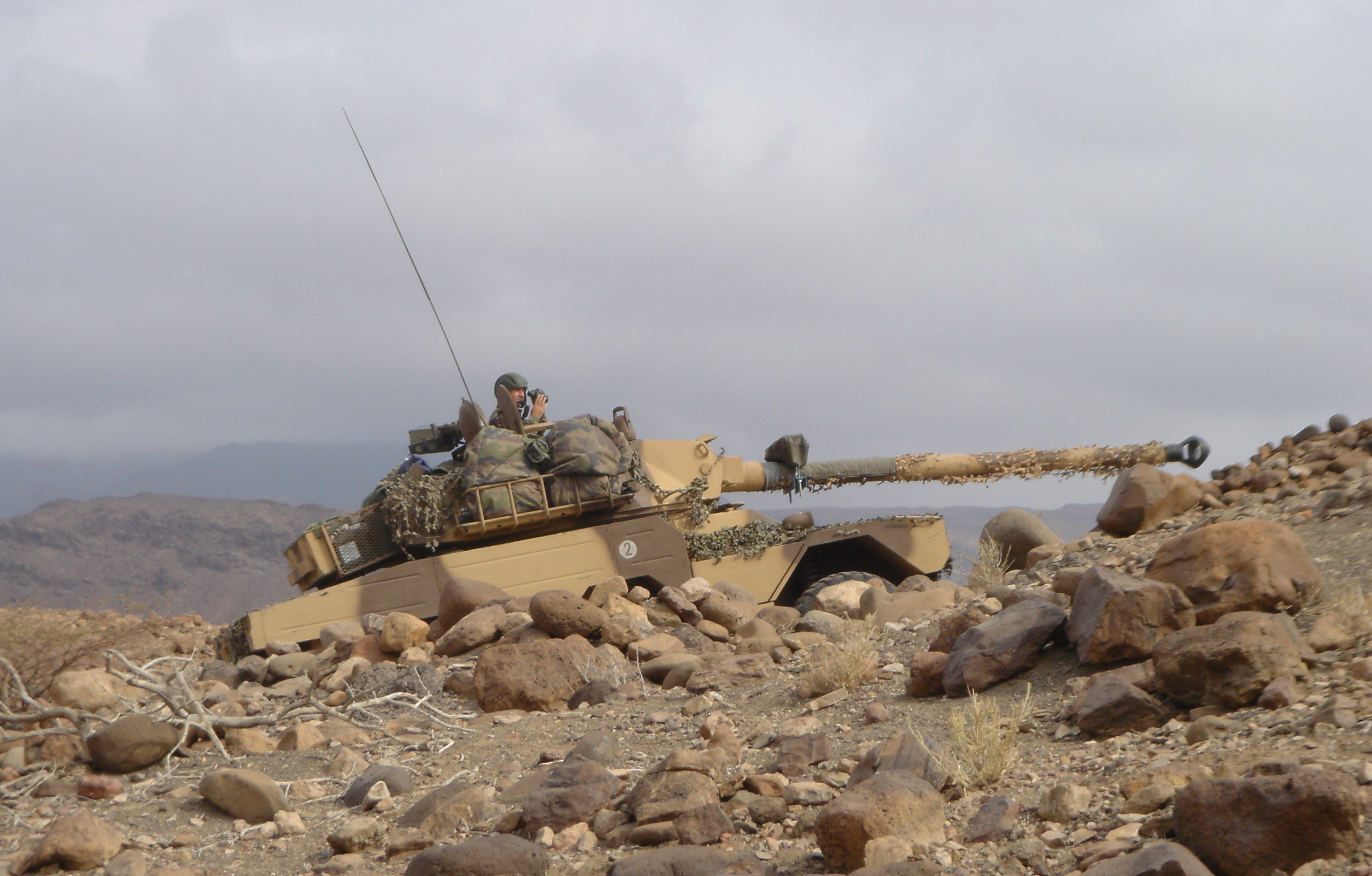 ERC 90 Sagaie de l'escadron de reconnaissance de la 13eDemi-brigade de Légion étrangère dans le désert djiboutien en 2005